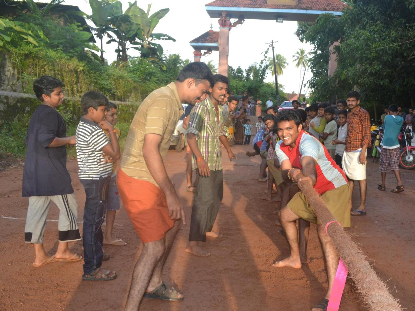 വടംവലി Vadam vali